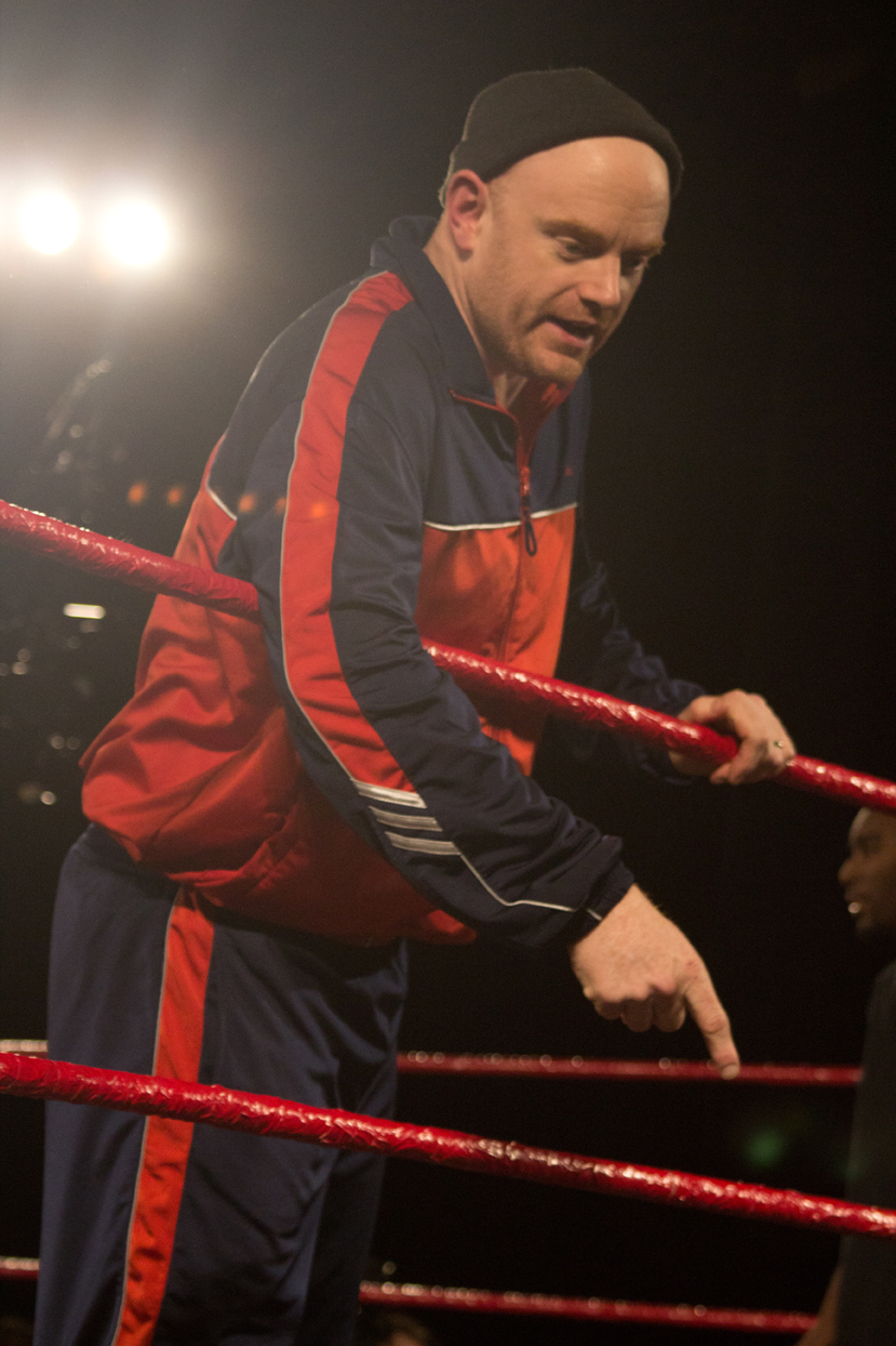 Manager Brutal Bob